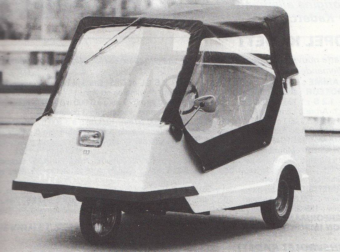 VITREX minicar